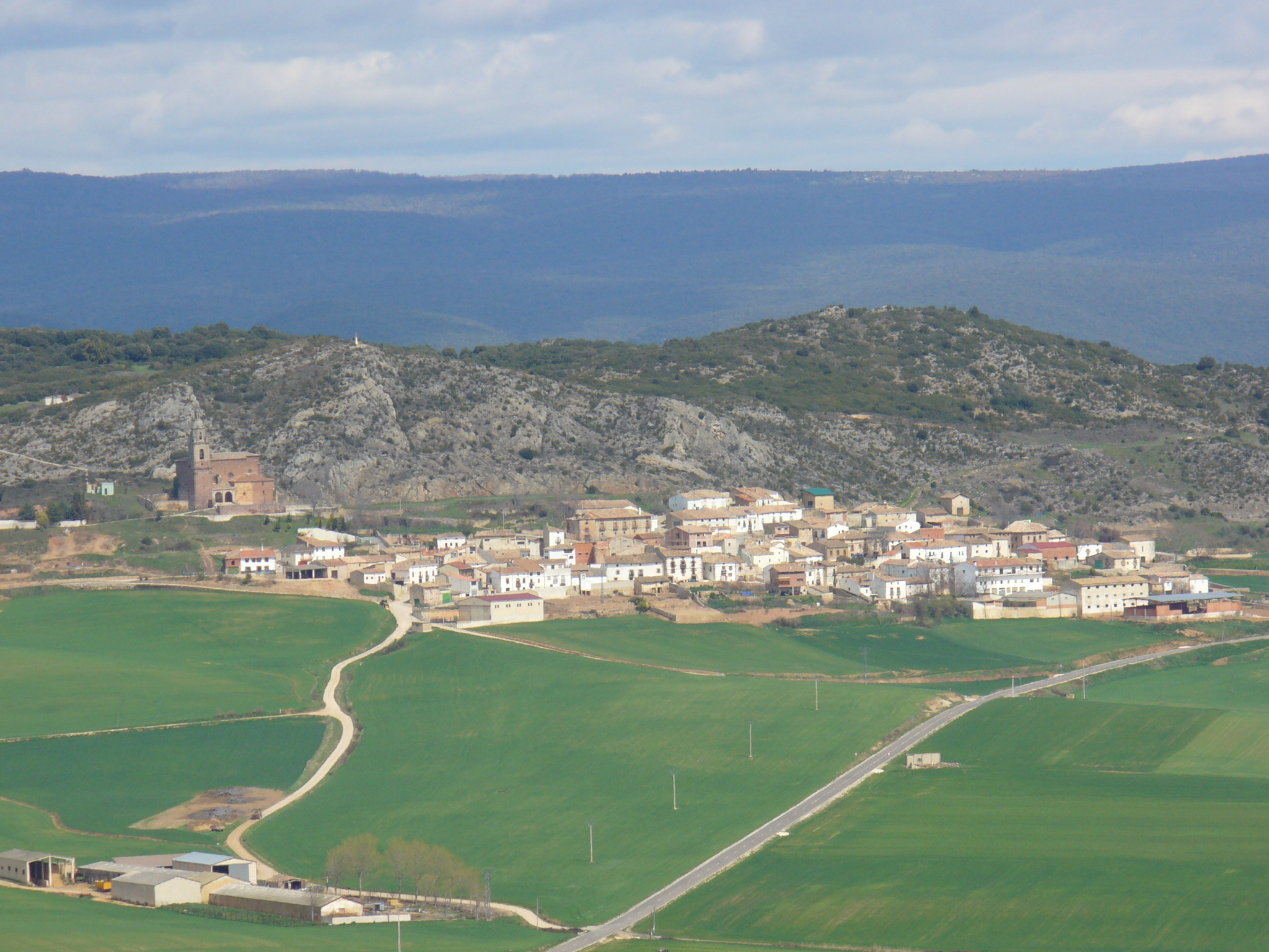 Nafarroako Piedramillera eta Lokiz goi-ordokia.